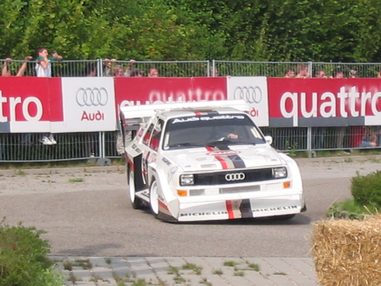 Audi Sport quattro S1 Pikes Peak im August 2005. Am Steuer sitzt Walter Röhrl.